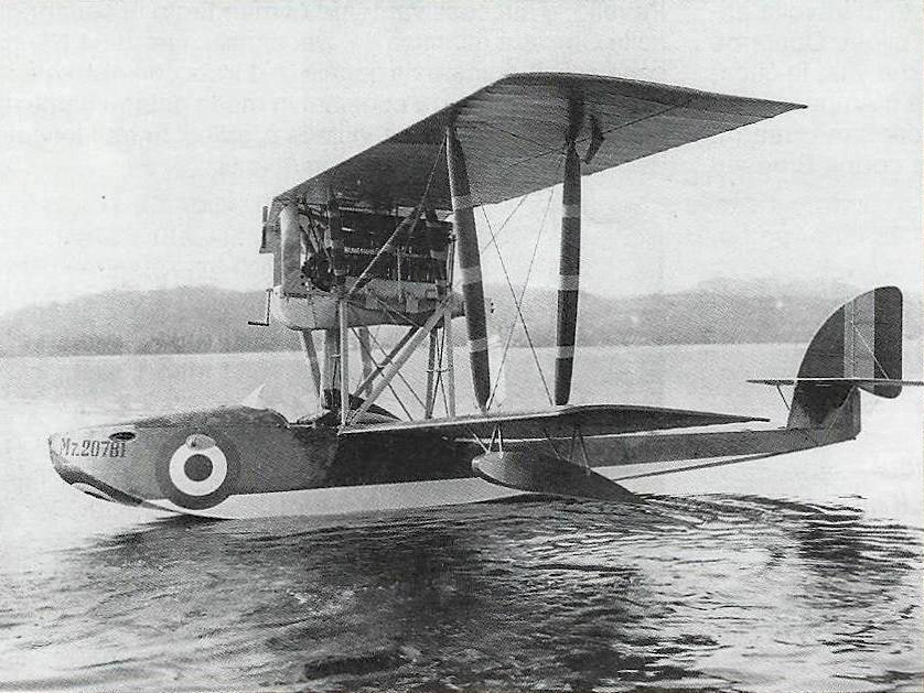 Macchi M.7 matricola 20781, presumibilmente Lago di Varese, Schiranna.